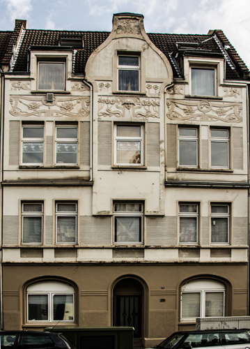 Stolpersteine Dortmund